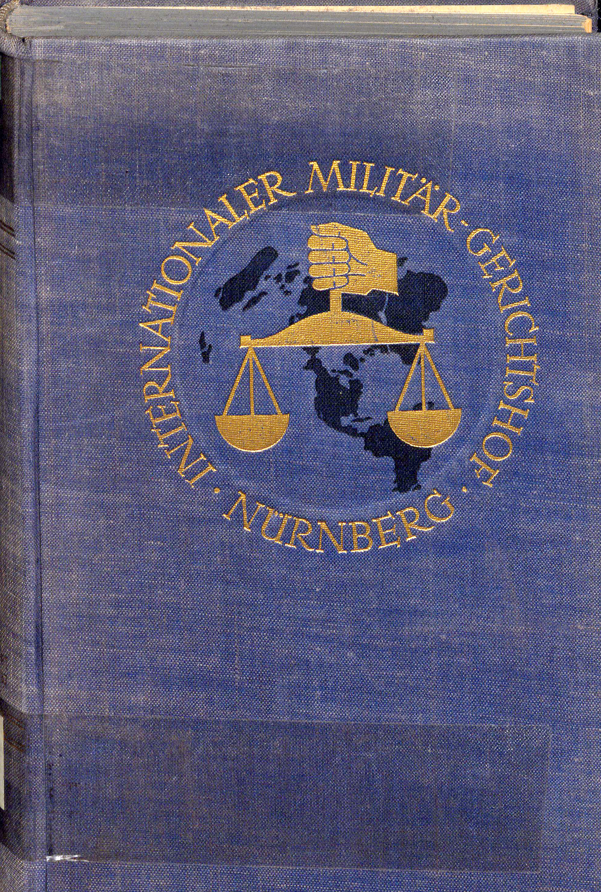 Nuremberg trials protocols German edition vol 42 1949 cover